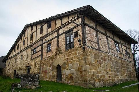 Jauregi (Zerain, Gipuzkoa). Dorretxe zaharreko zilarrigintzako kantoia nabarmentzen da.